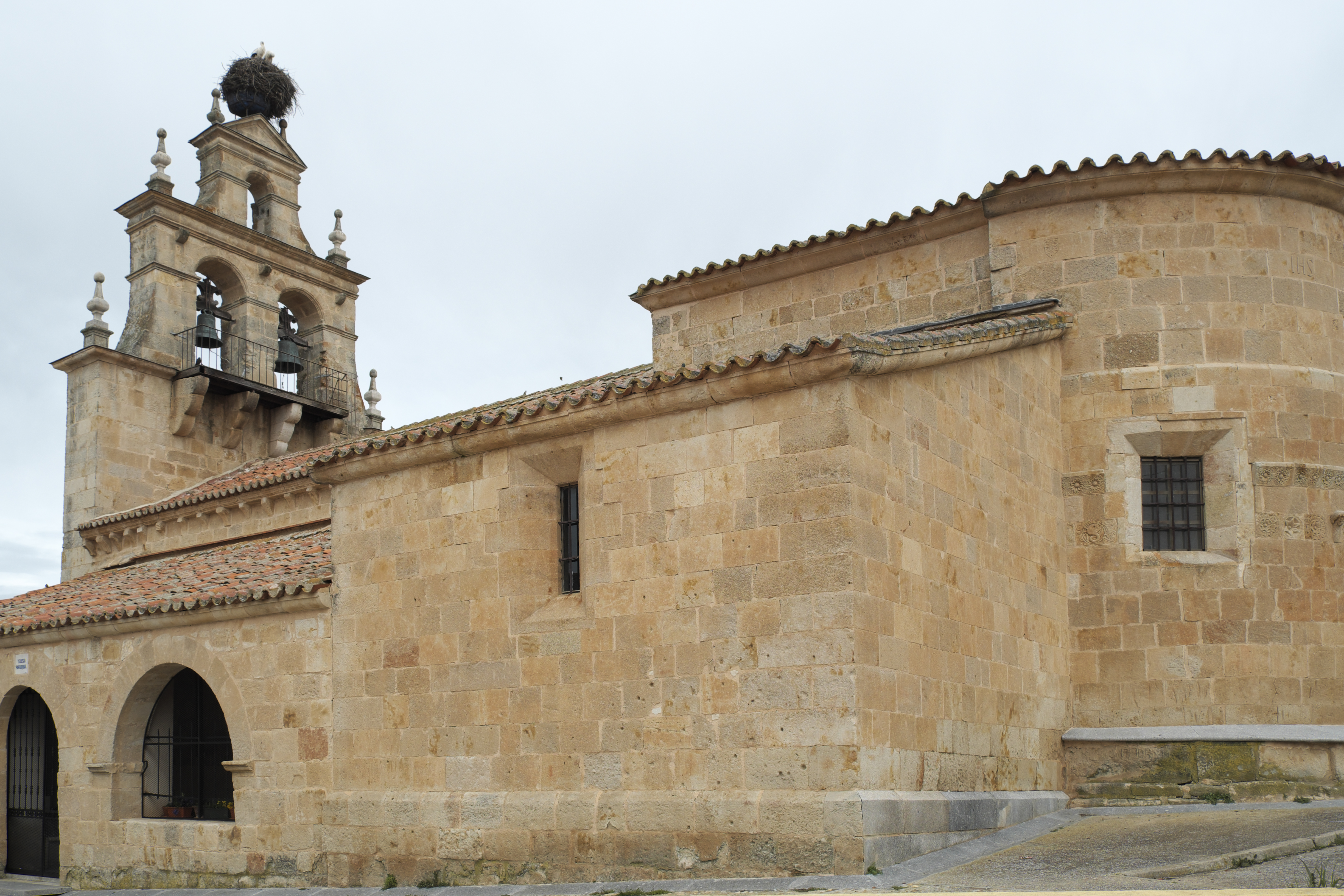 Kirche Santa María in Almenara de Tormes in der Provinz Salamanca Provinz Salamanca (Kastilien-León/Spanien), aus dem 12. Jahrhundert, Ansicht von Südosten